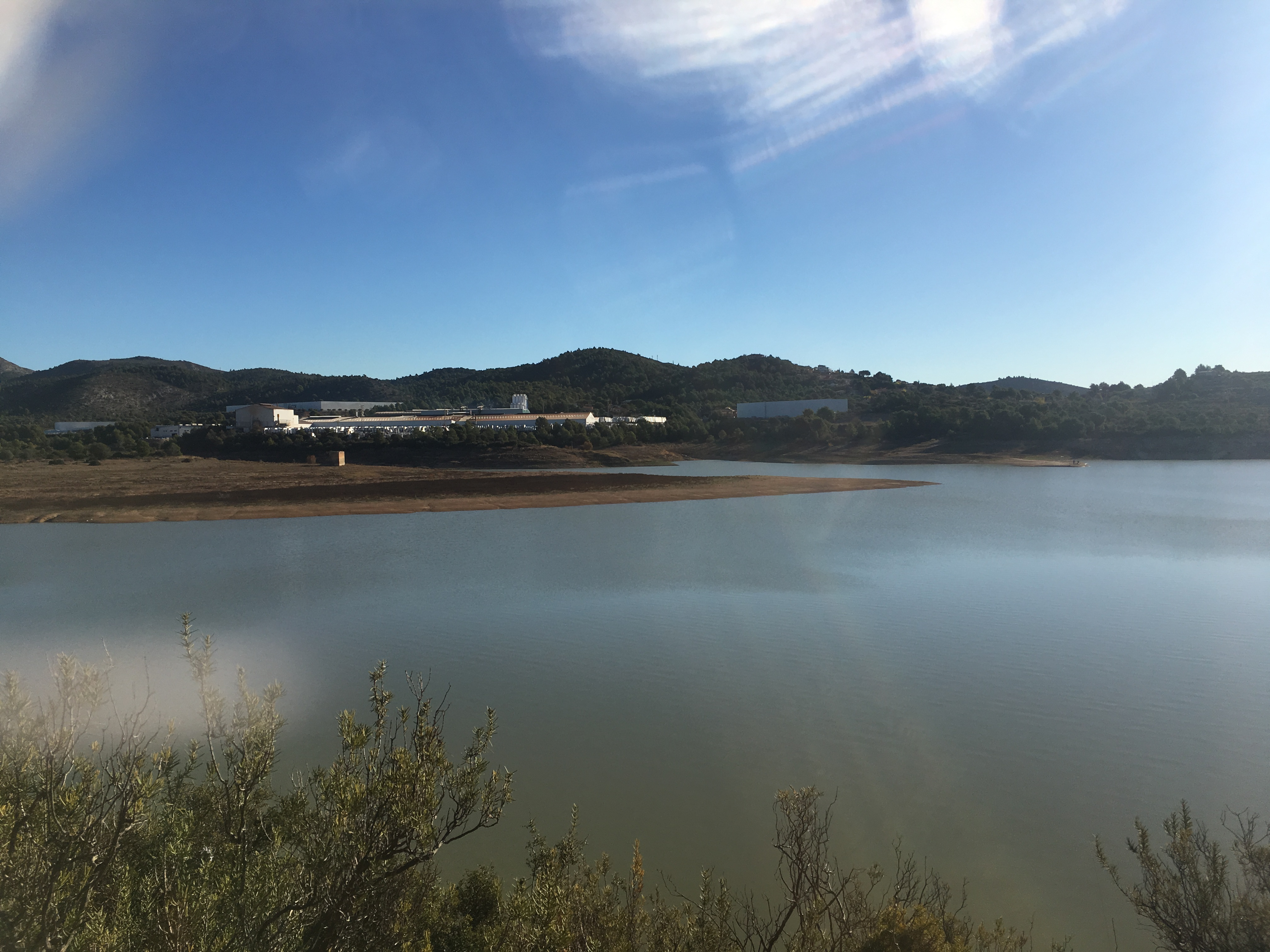 En la fotografía se puede ver como el pantano de Maria Cristina está envuelto en un paisaje humanizado.